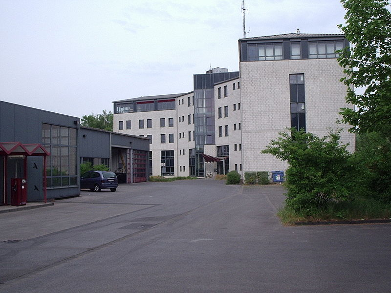 Verwaltungsgebäude der Feuerwehr Duisburg auf dem Gelände der Hauptfeuerwache, hier ist auch die Leitstelle untergebracht